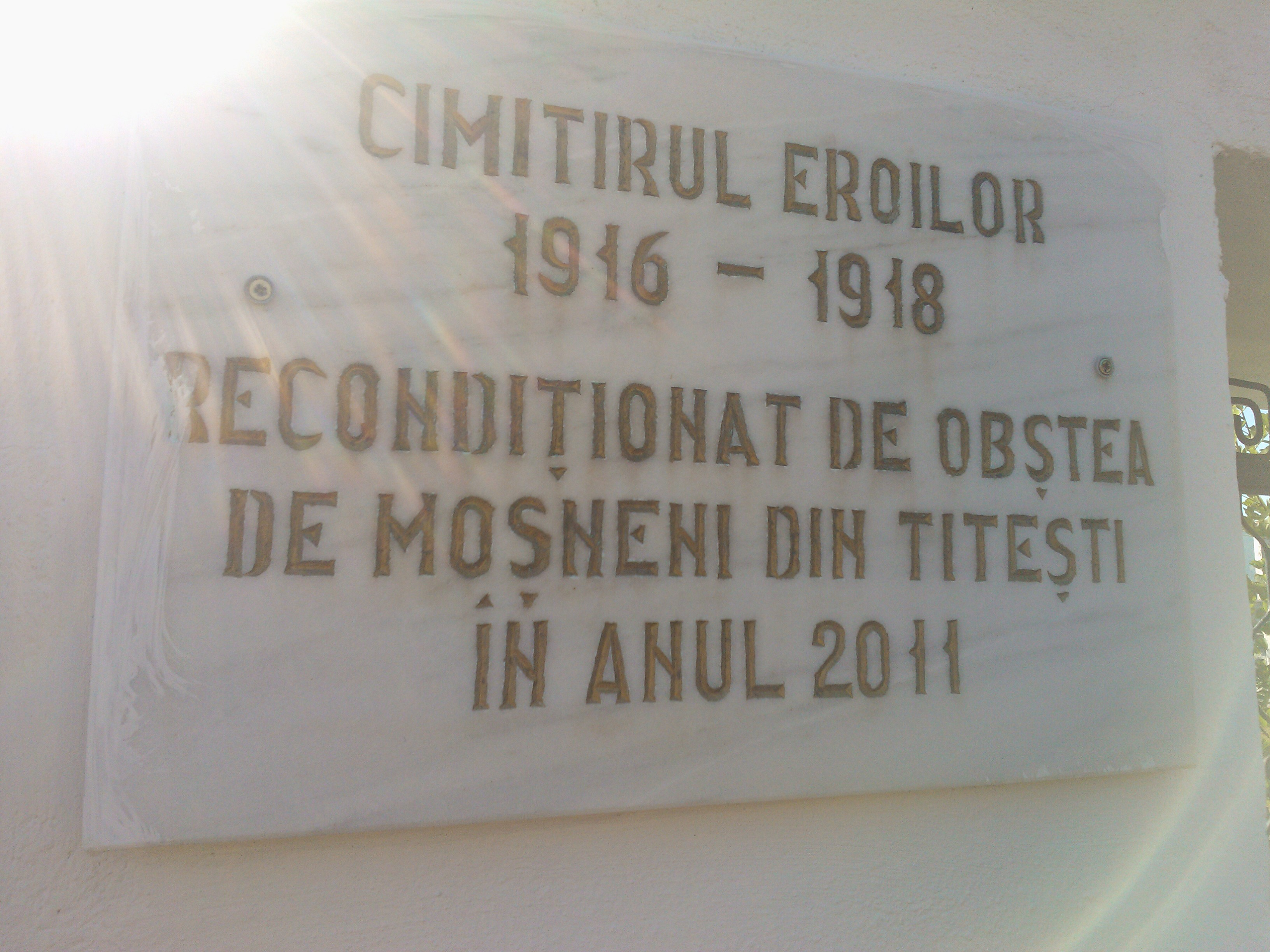 Cimitirul Eroilor din primul război mondial (1916 - 1918)